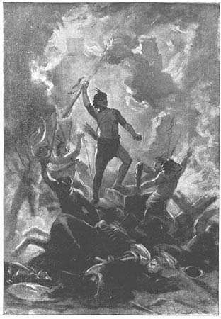 «Yo soy Caupolicán, que el hado mío / por tierra derrocó mi fundamento, / y quien del araucano señorío / tiene el mando absoluto y regimiento» (canto XXXIV) Alonso de Ercilla y Zúñiga, La Araucana, edición de José Toribio Medina, Santiago de Chile, Imprenta Elzeviriana, 1910, hoja de lámina entre las pp. 552 y 553.